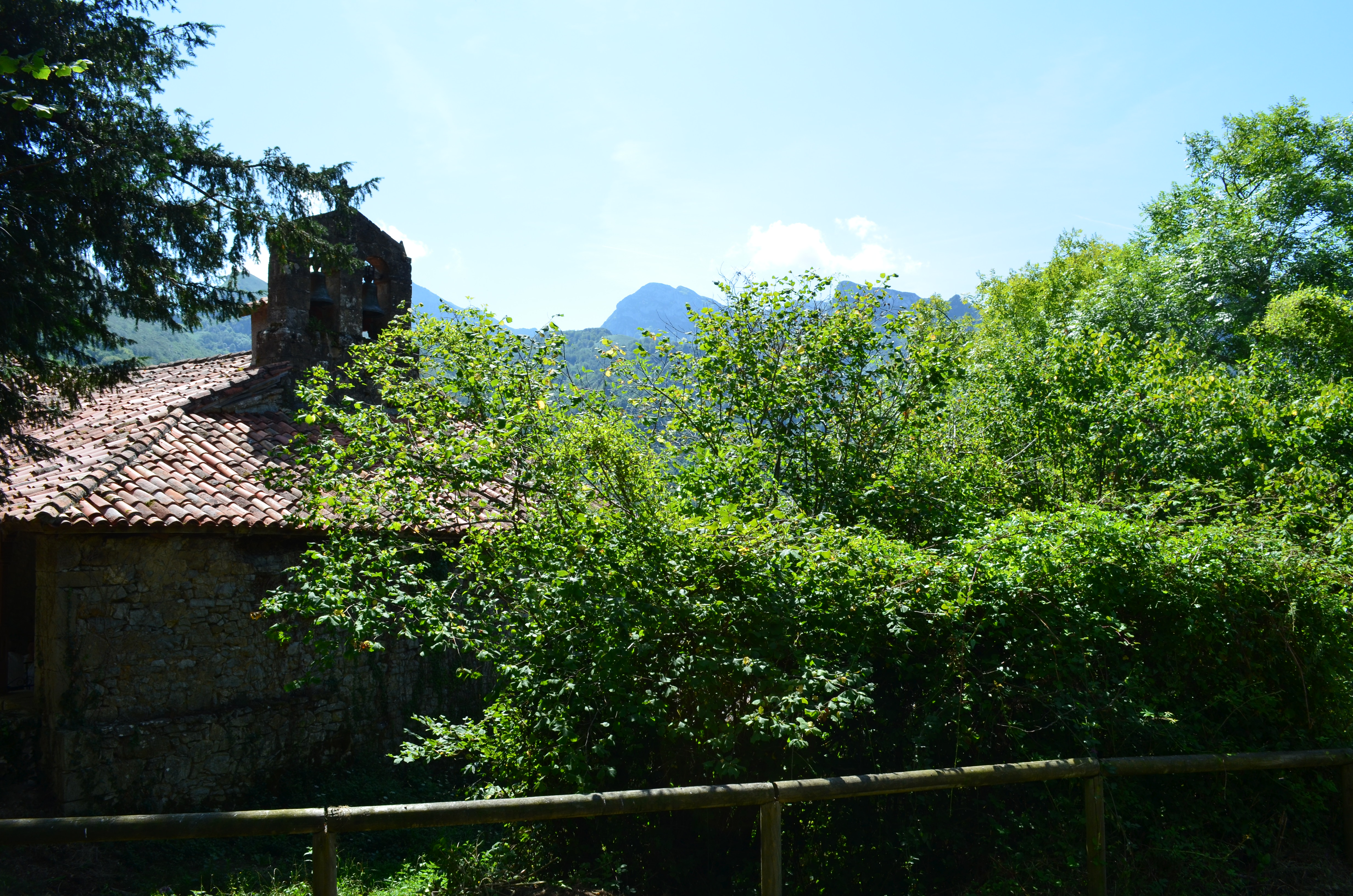 Capilla Nuestra Señora de Las Nieves (Ponga, Asturias)